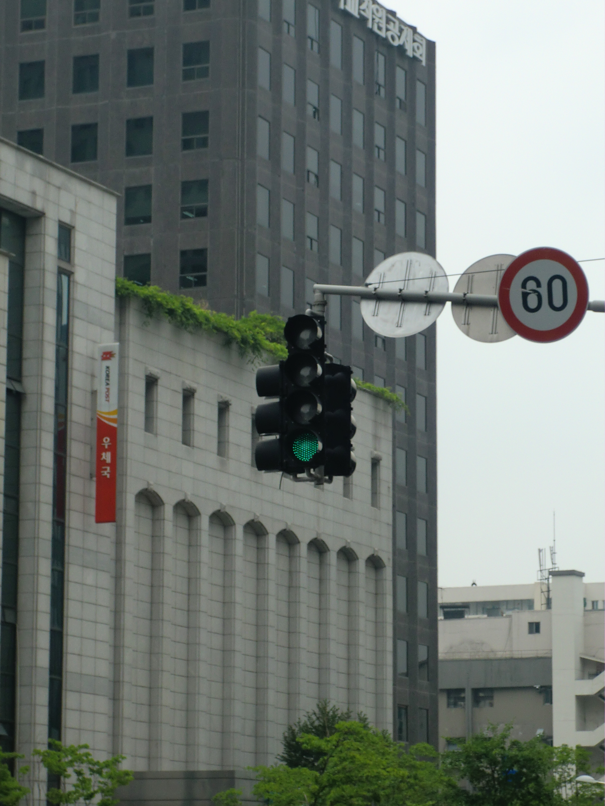 三色信号機縦型（青）